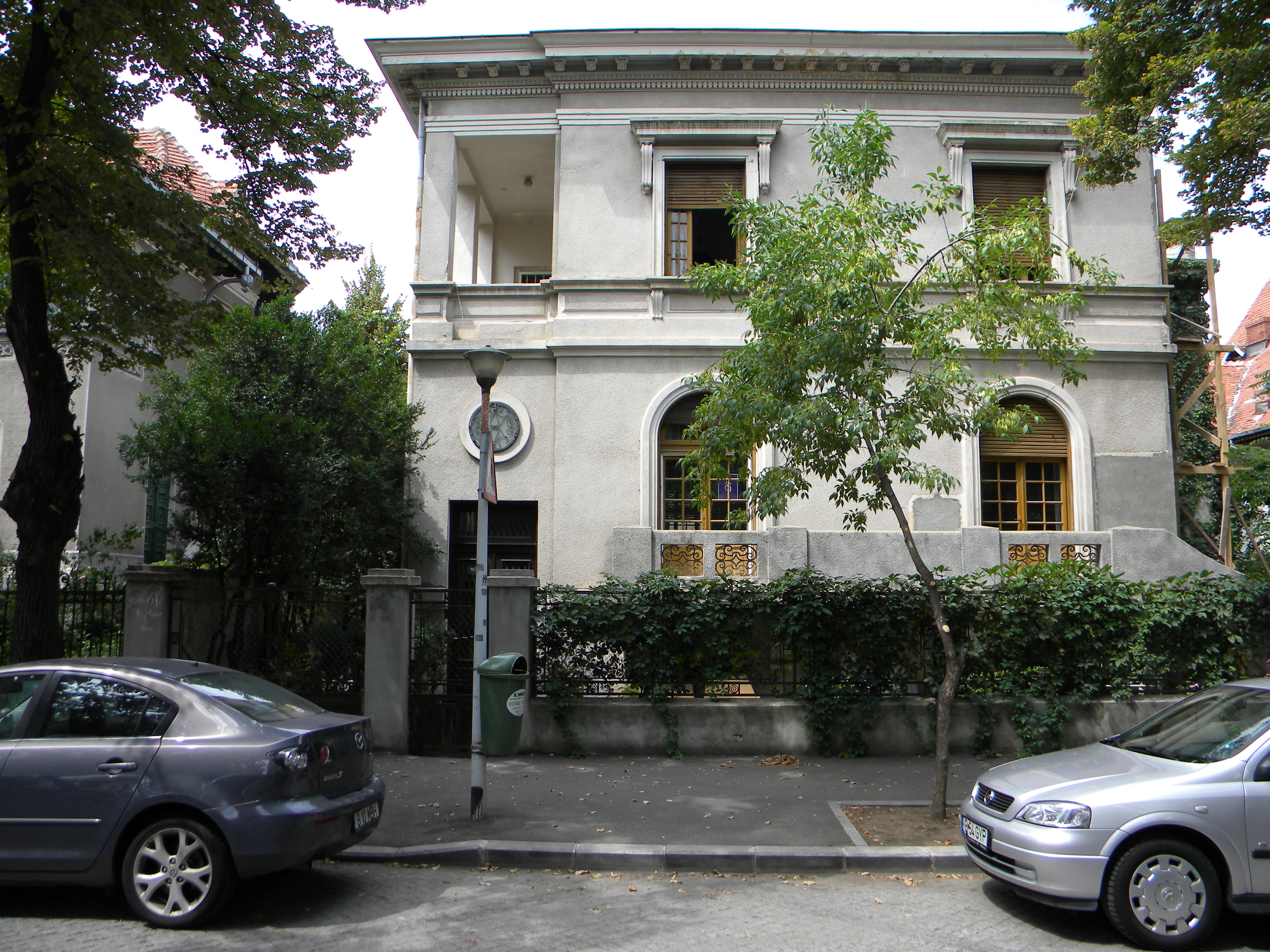 Imobil pe Bd. Aviatorilor, nr. 9, Bucuresti sect 1